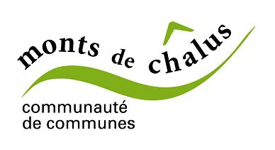 Logo officiel de la Communauté de Communes des Monts de Châlus